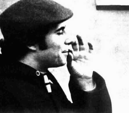 Italian director Marcello Aliprandi